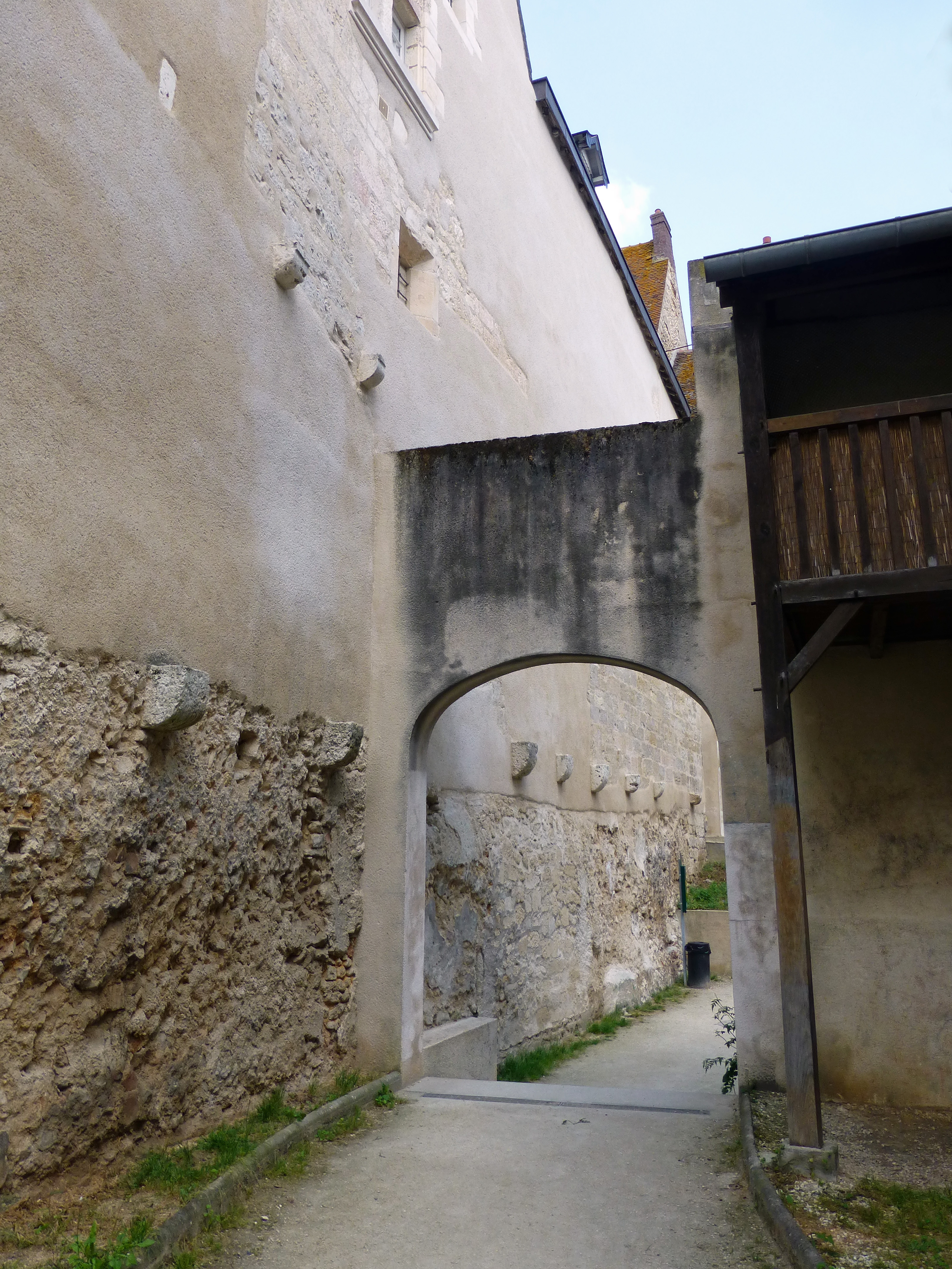 Bourges (Cher) : remparts gallo-romains